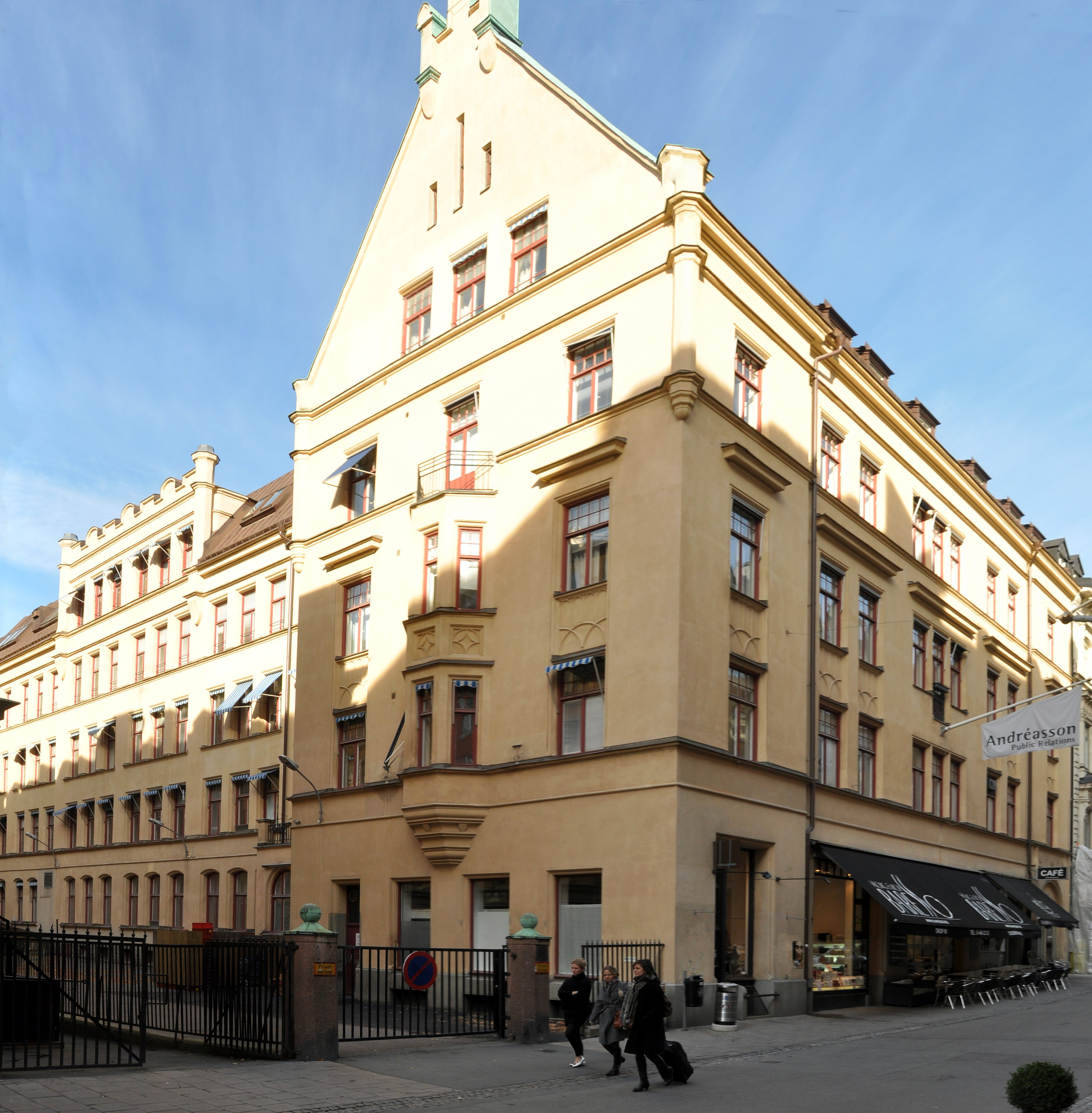 Almquistska samskolan, Nybrogatan 19, 21. Byggnadsår 1903-05, arkitekt Konrad Elméus, byggherre Fastighets AB Sofia, byggmästare K Höglund och N J Bengtsson. Idag har bland annat Hillelskolan sina lokaler i byggnaden.